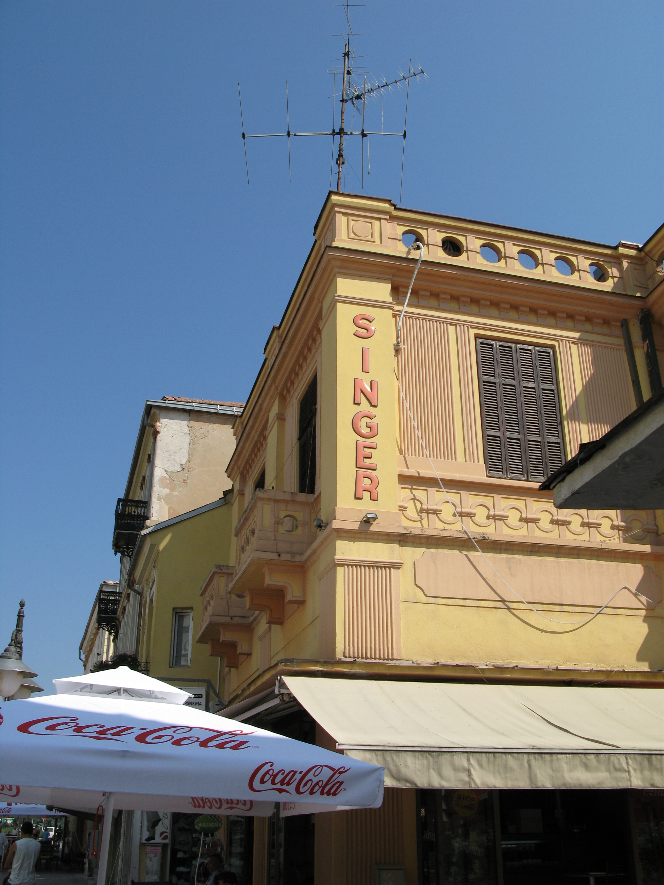 Сингер, Битољ.